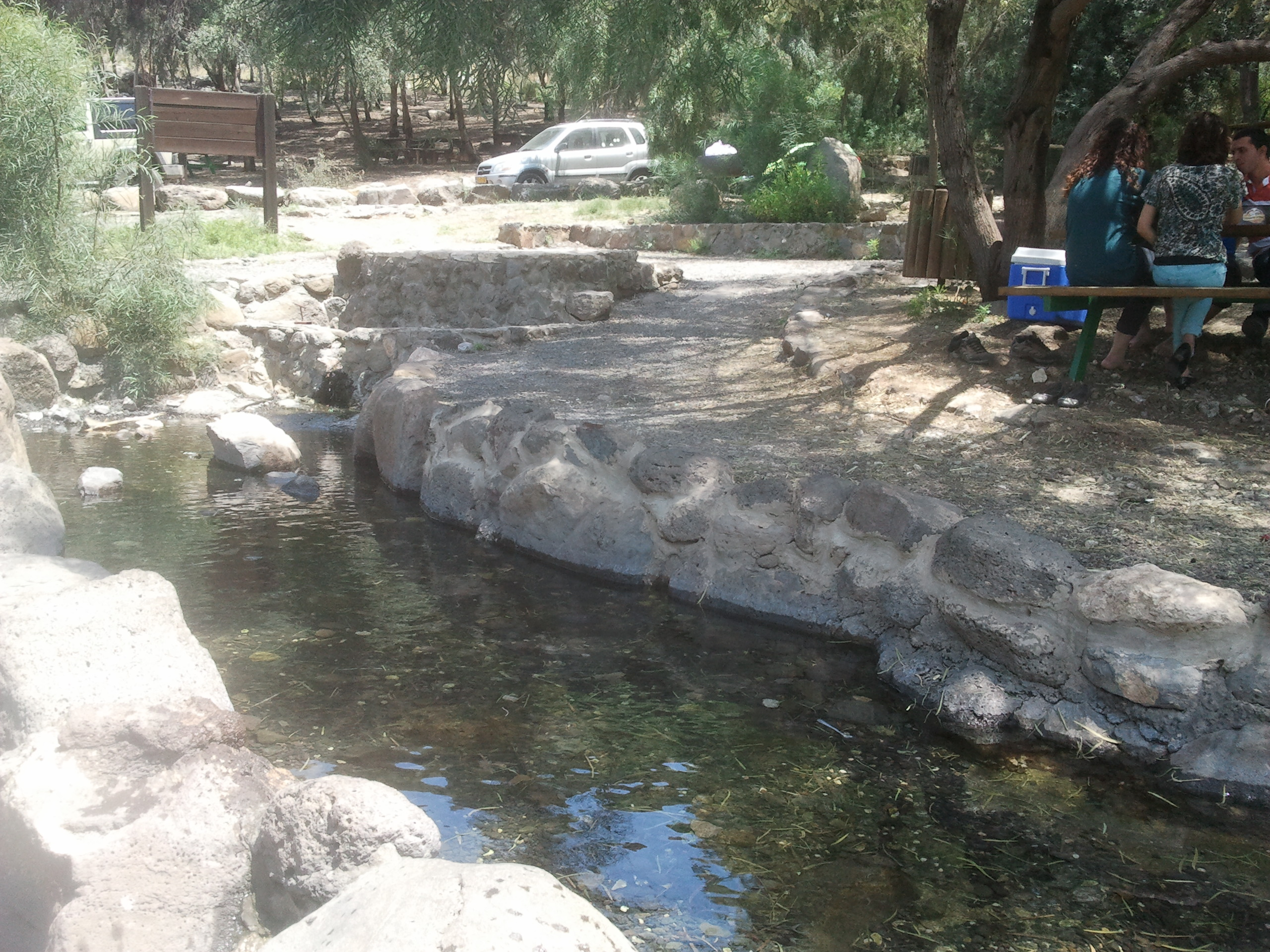 עין עקוב הוא מעיין הנובע ביער מבוא חמה בדרומה של רמת הגולן, ולצידו חניון לילה. מאז חנוכתו של שביל הגולן בשנת 2007, משמש המקום כנקודת הקצה הדרומית של השביל.